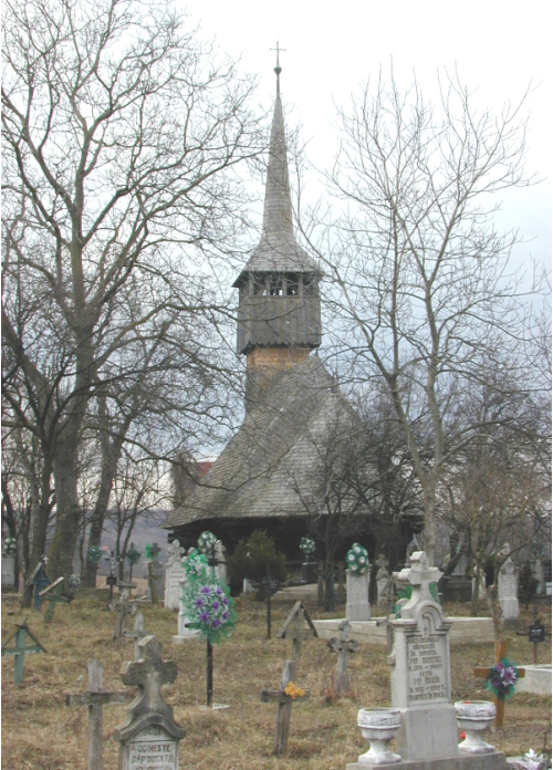 Biserica de lemn din Soconzel, judeţul Satu Mare.